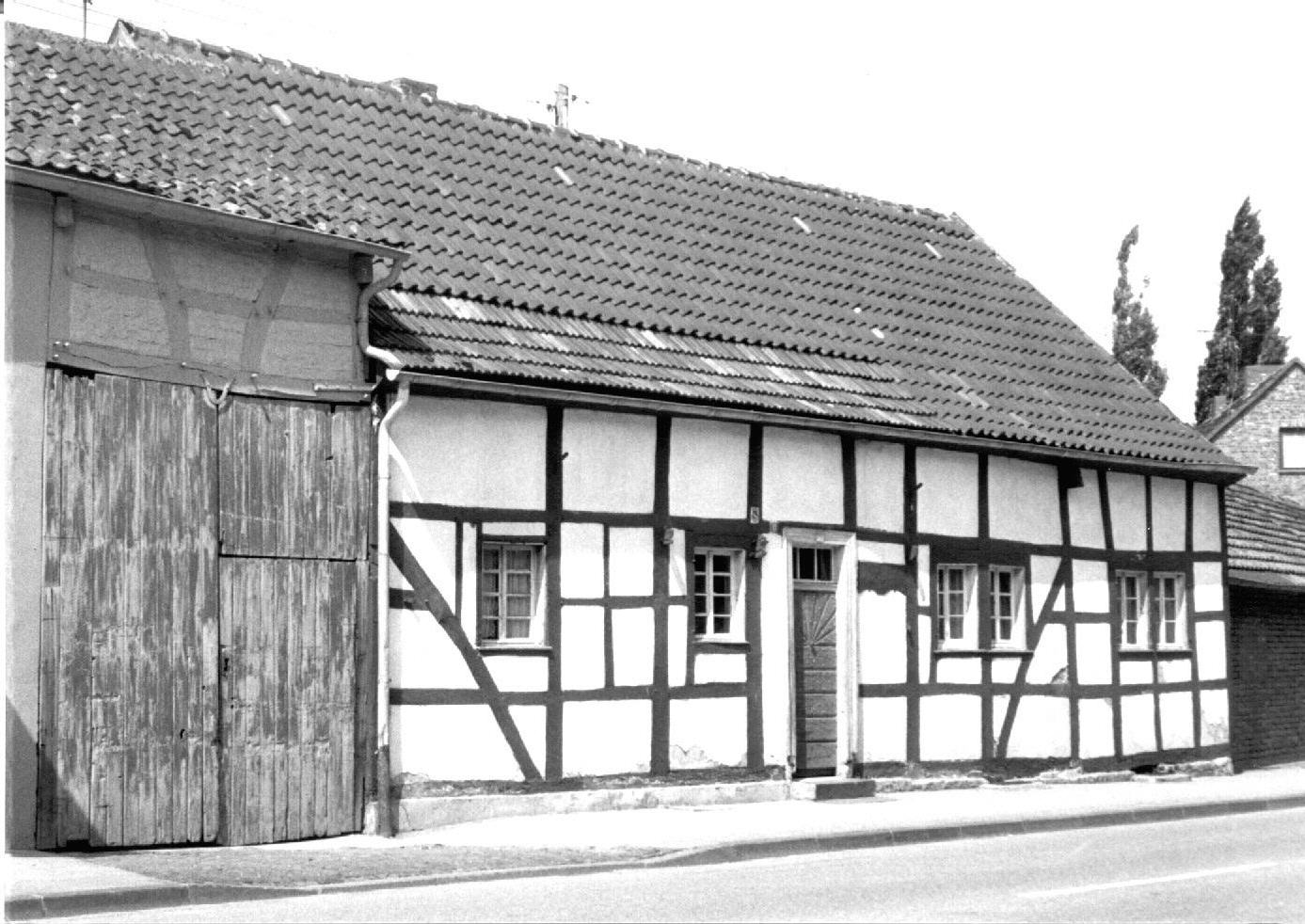 Das Fachwerkhaus Bahnhofstraße 11 in Nörvenich